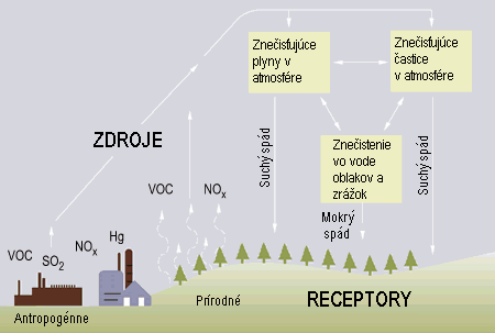 Zdroj: sk::w:en:Image:Origins.gif, pôvodne z [1] Autor:United States federal Government, preklad: Redaktor:Wek1 Licensing